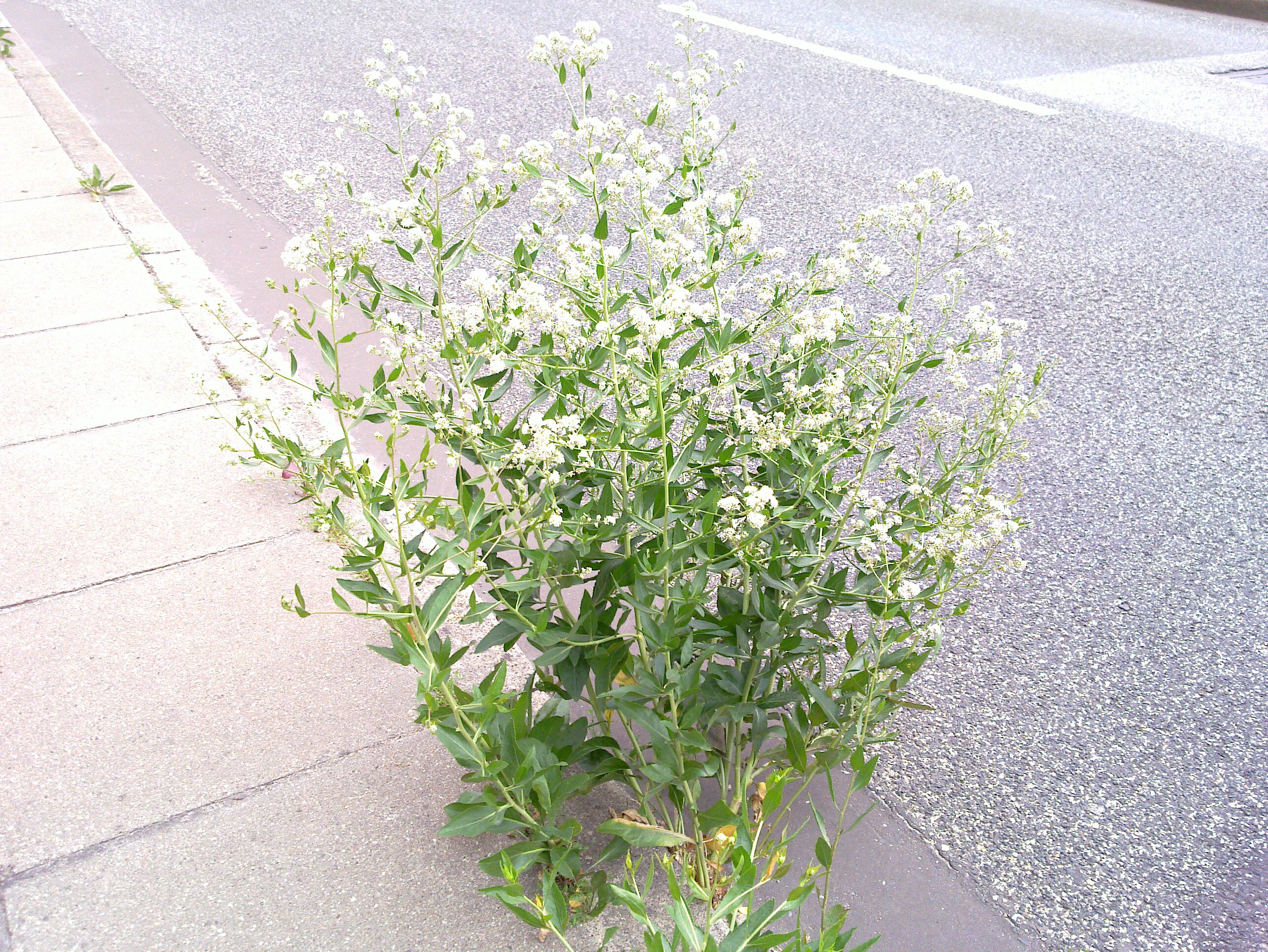 pfefferkraut